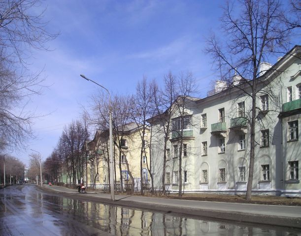 Old street of Ozersk